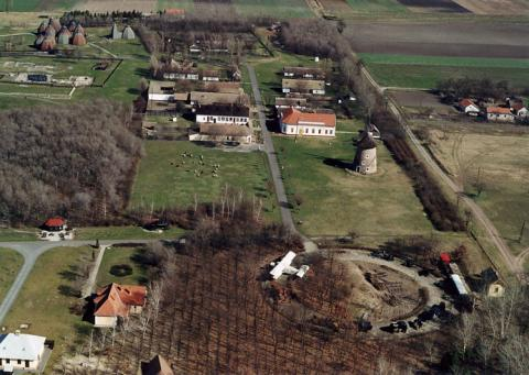 Ópusztaszer, Hungary, aerialphotography